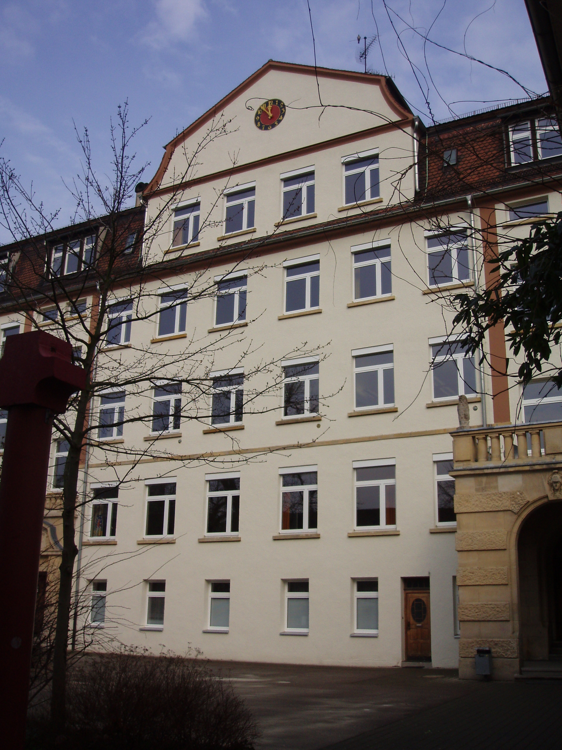 Georgii-Gymnasium Esslingen, Altbau